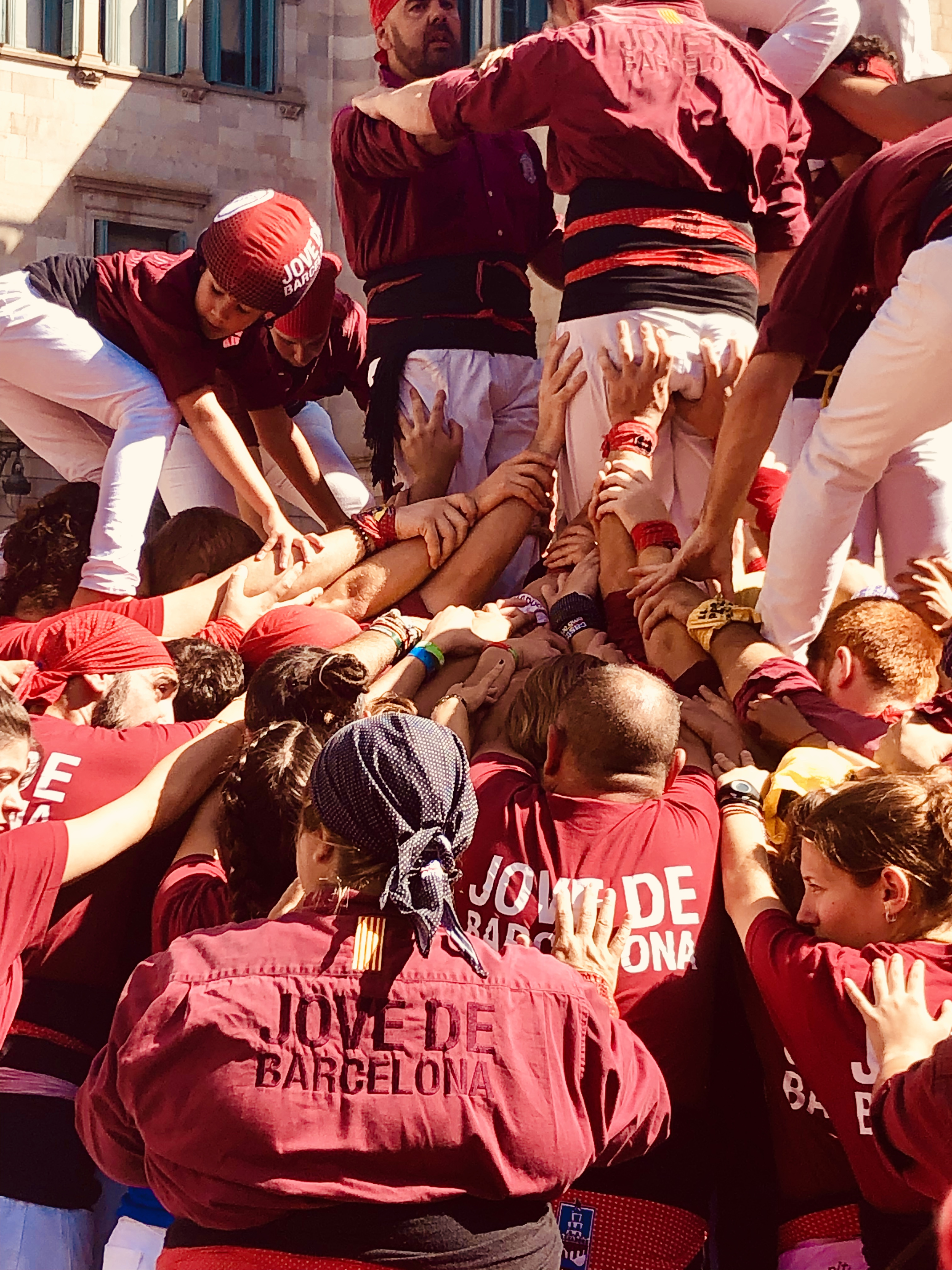 Le torri umane, in catalano "castellers", richiedono gran capacità di controllo, concentrazione e lavoro di squadra.